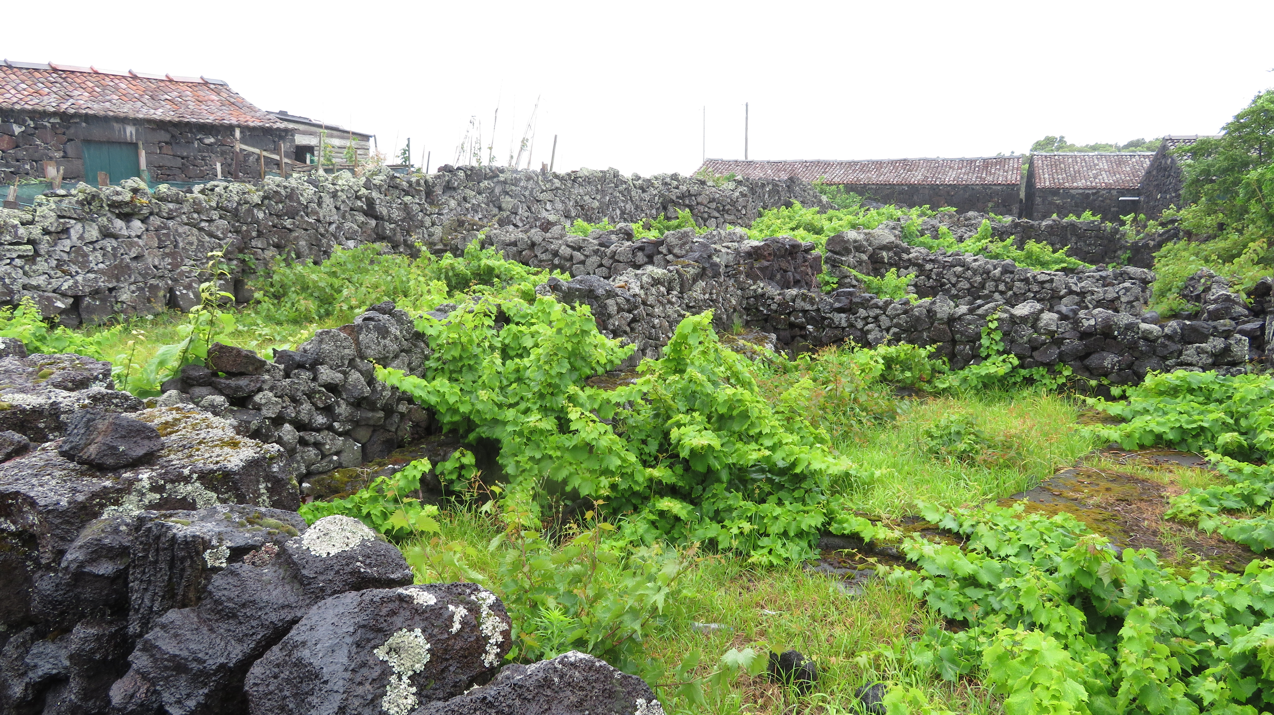 Traditioneller Weinanbau, Criação Velha, Ilha do Pico, Azoren, Portugal